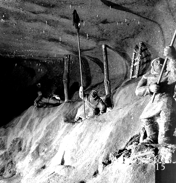 Середньовічні покутники